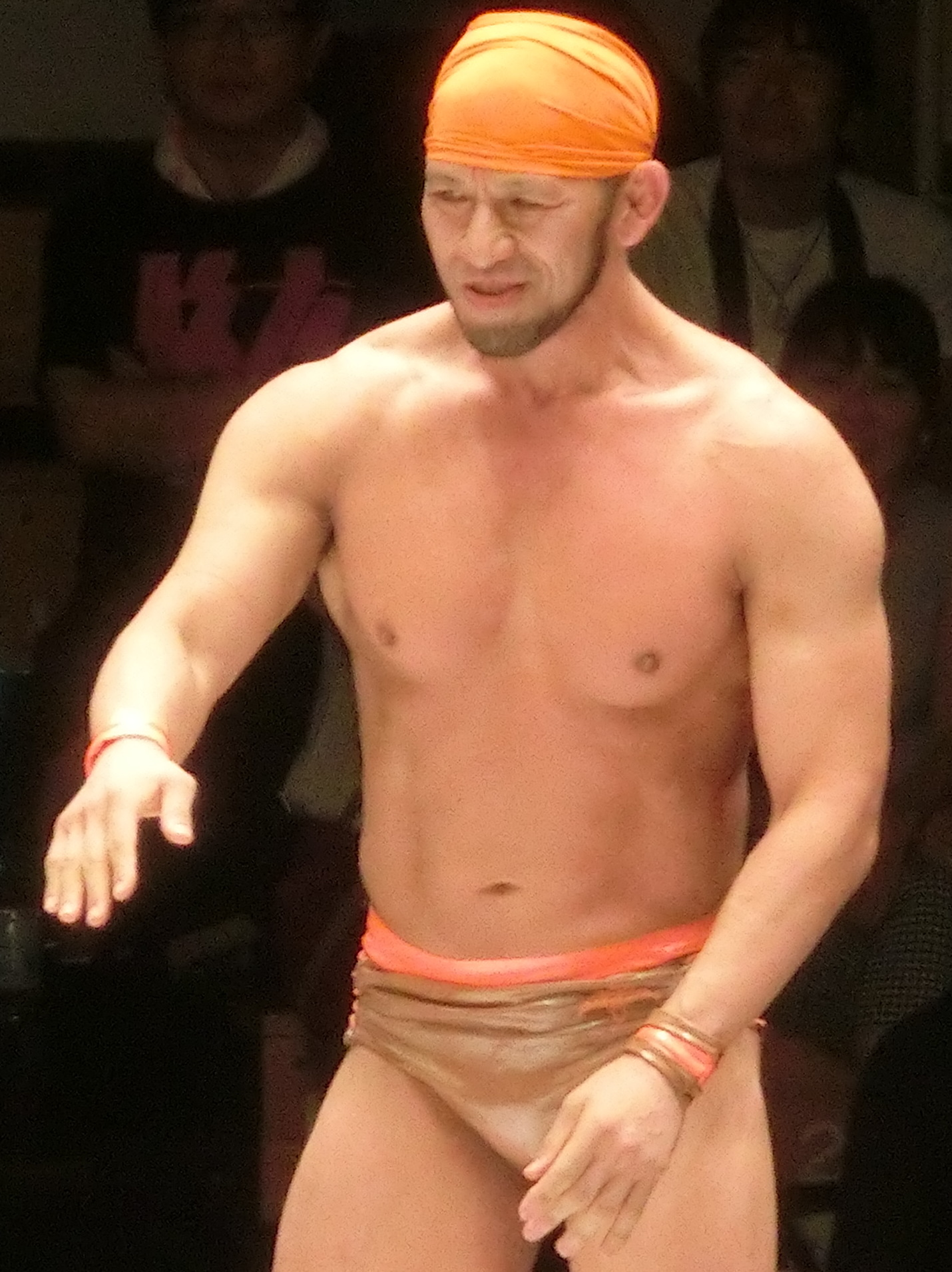 2018年8月31日、後楽園ホール